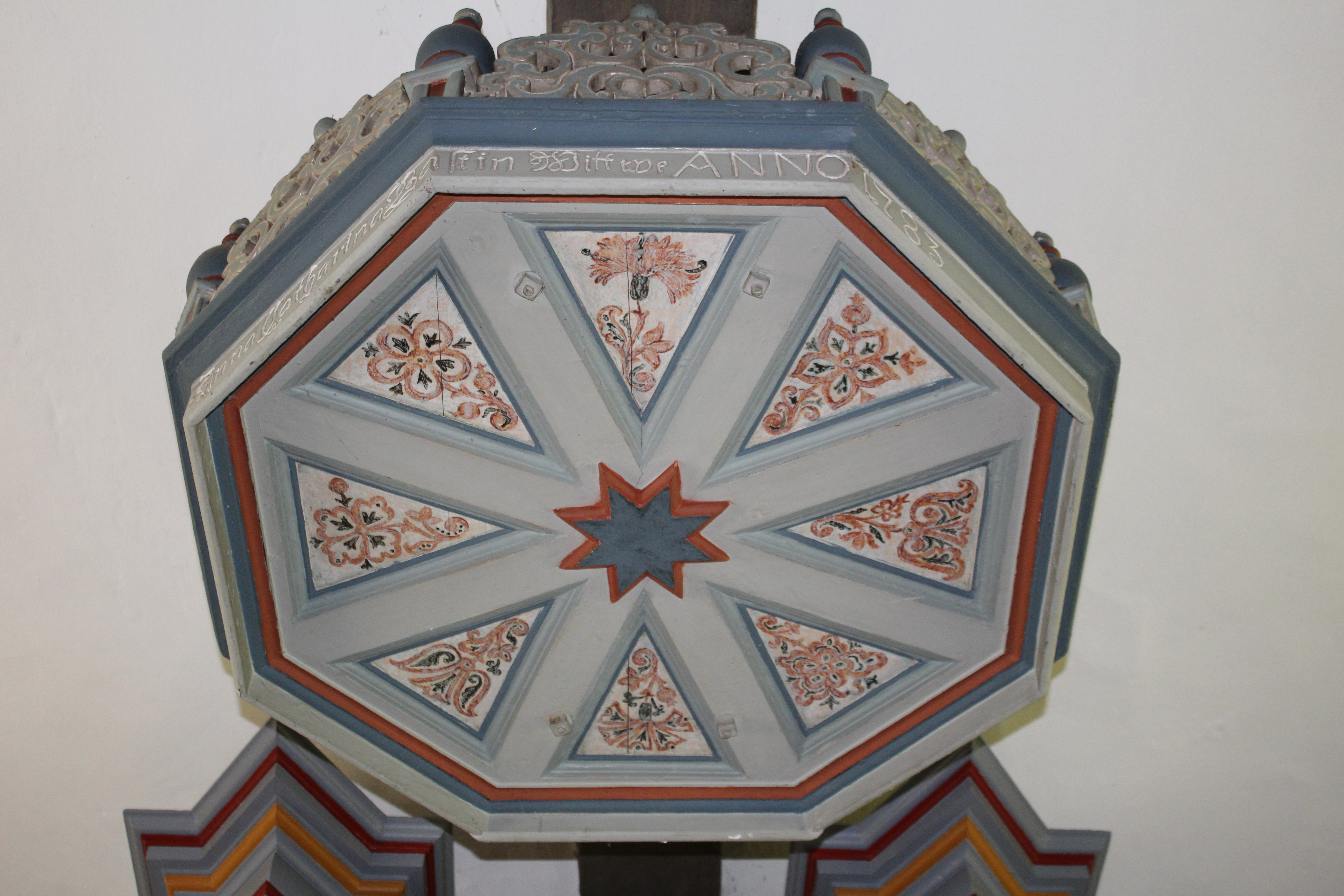 Ev. Kapelle Steinbrücken, Gemeinde Dietzhölztal, Hessen, Deutschland